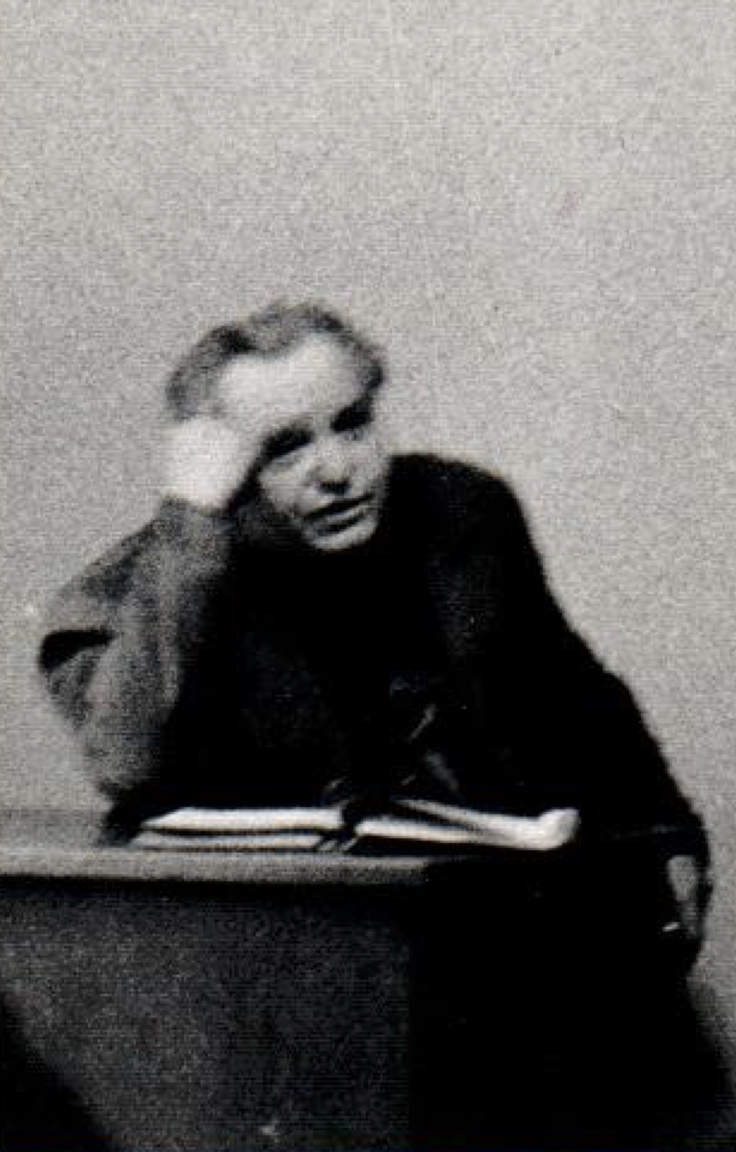 Vyučující na Cyrilometodějské bohoslovecké fakultě v Litoměřicích Prof. František Víšek. Autorem fotografie je Vladimír Gajdušek, který jako student udělal foto z lavice při vyučování.